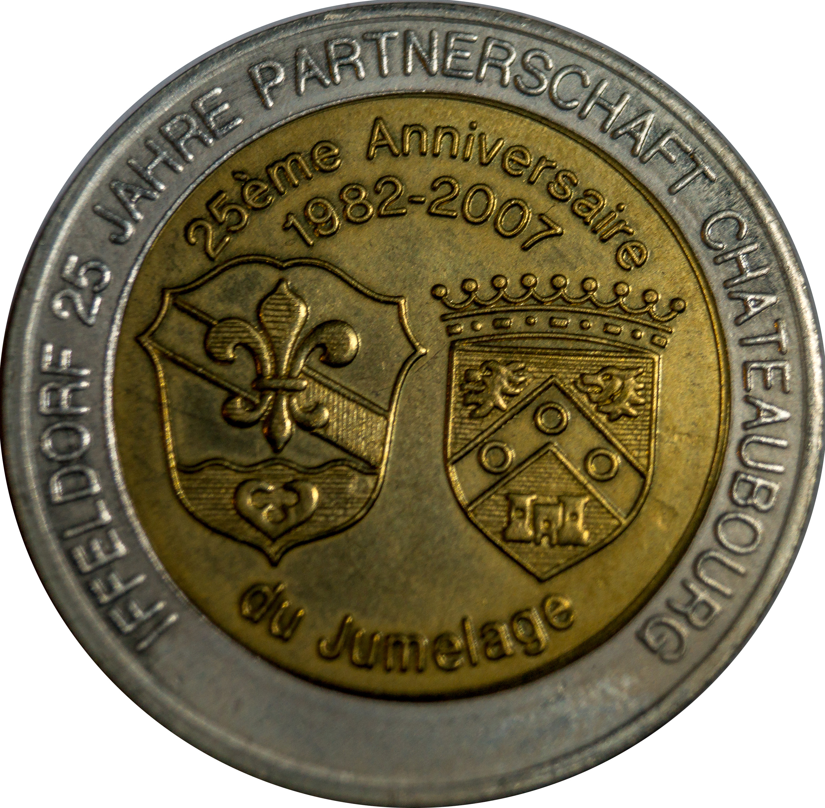 Medaille zum 25-jährigen Bestehen der Partnerschaft zwischen Iffeldorf und Châteaubourg. Text im Umlauf: „IFFELDORF 25 JAHRE PARTNERSCHAFT CHATEAUBOURG“. Der Avers zeigt links das Iffeldorfer Wappen, rechts das von Châteaubourg, der Text lautet: « 25ème Anniversaire – 1982-2007 – du Jumelage »